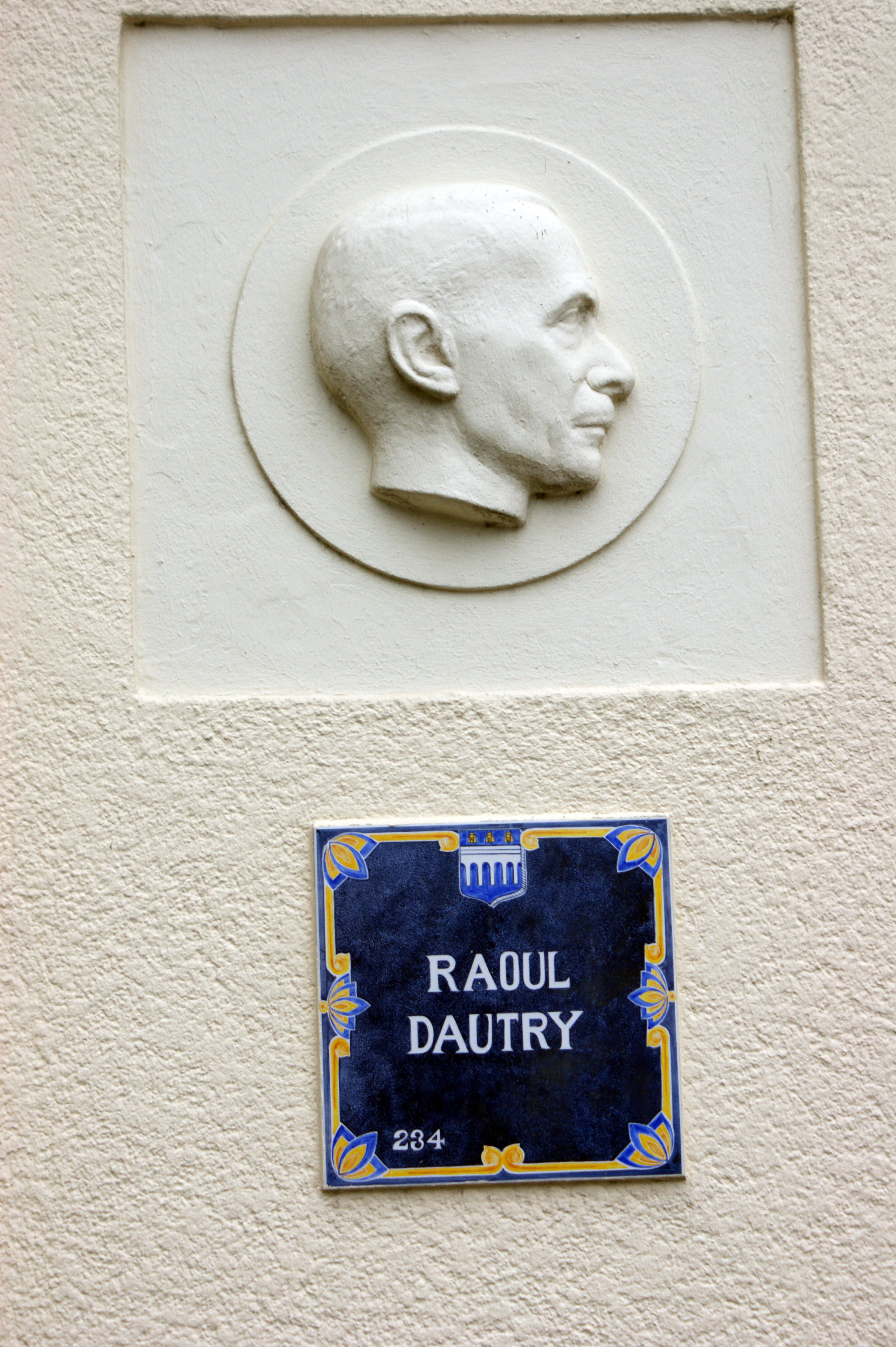 La gare de Barentin, hommage à Raoul Dautry sur le mur du bâtiment voyageurs.